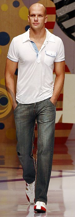 Brazilian swimmer Fernando Scherer. Floripa Fashion Donna DC - Summer 2007